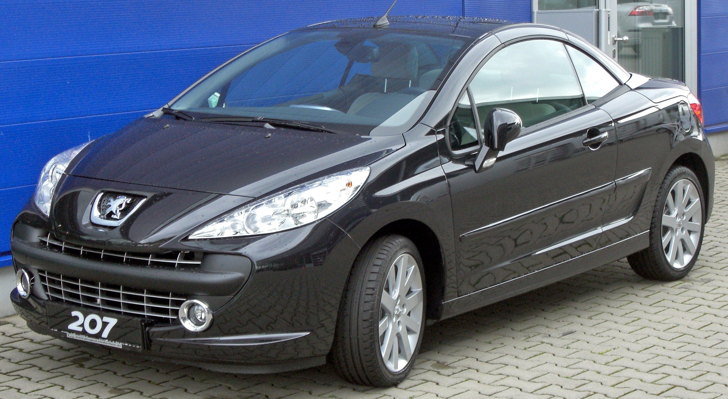 Peugeot 207CC